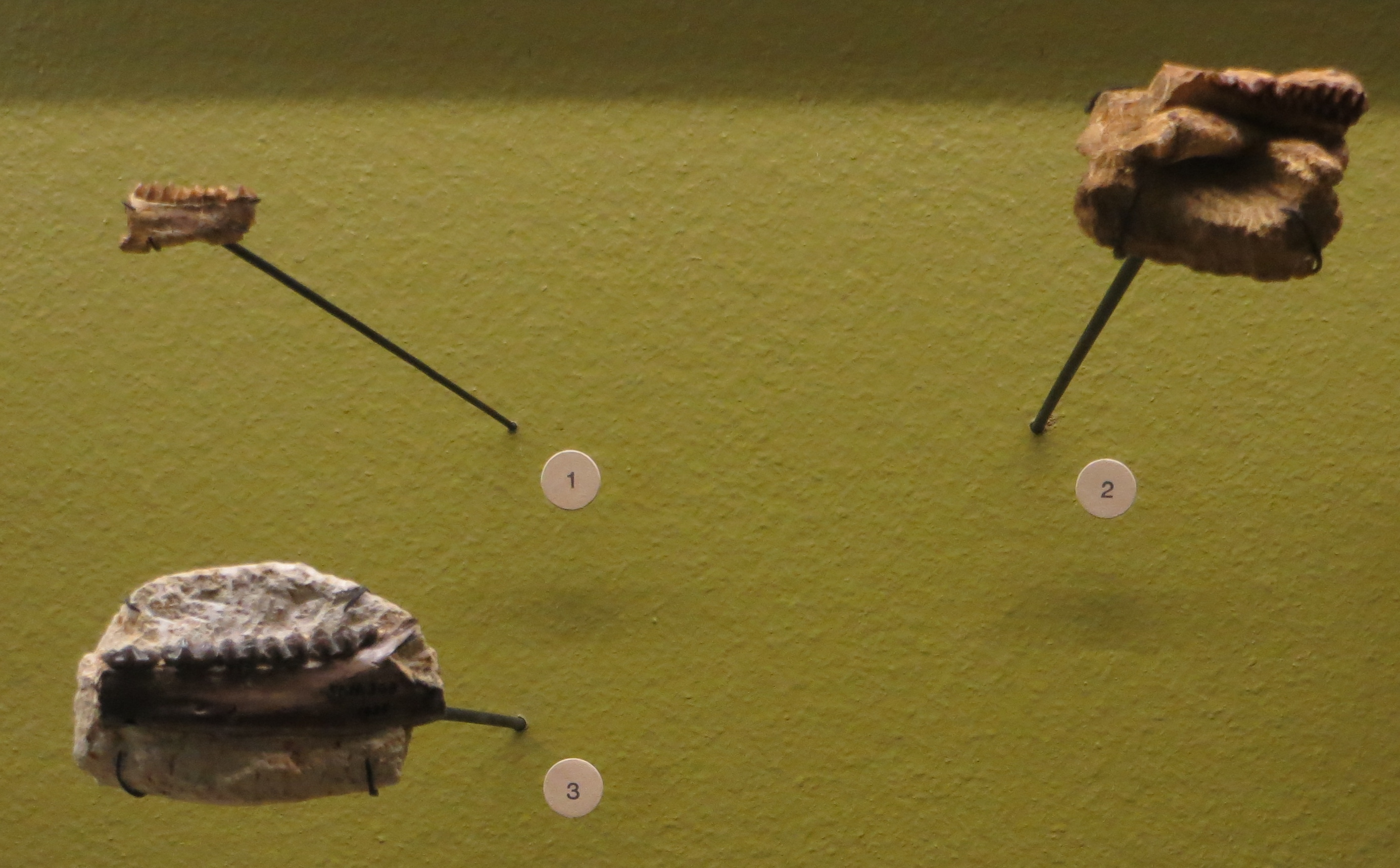 Fossil of Dichodon - Took the picture at Natural History Museum, Basel